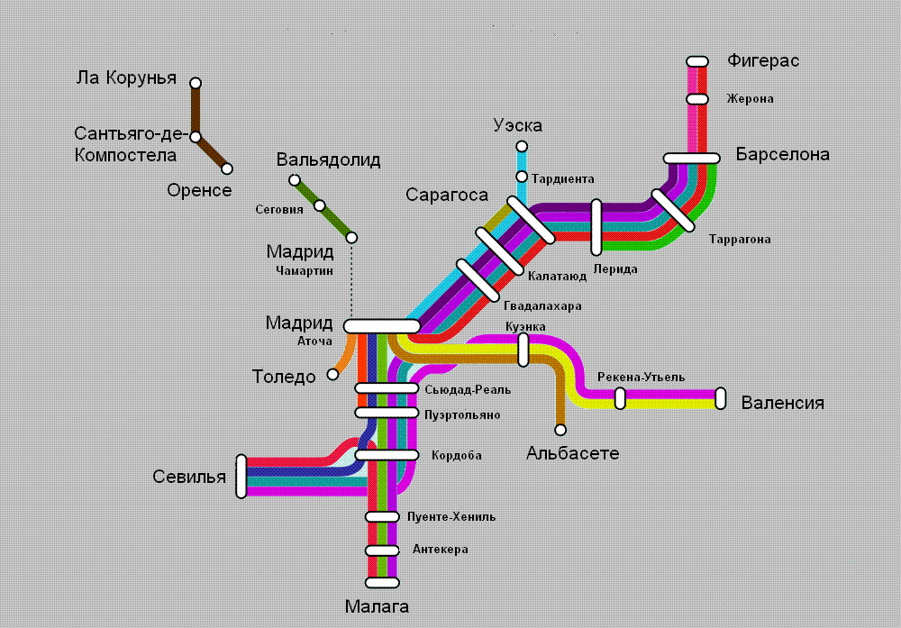 Это схема линий высокоскоростных поездов AVE в Испании. Развитие сети верно для мая 2013 года